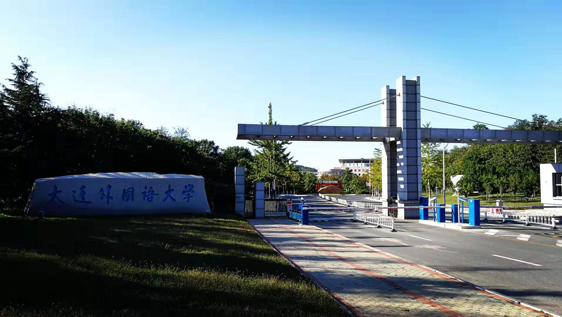 中文（中国大陆）: 大外旅顺校区正门